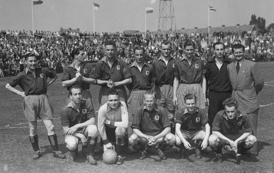 HFC Haarlem elftal.